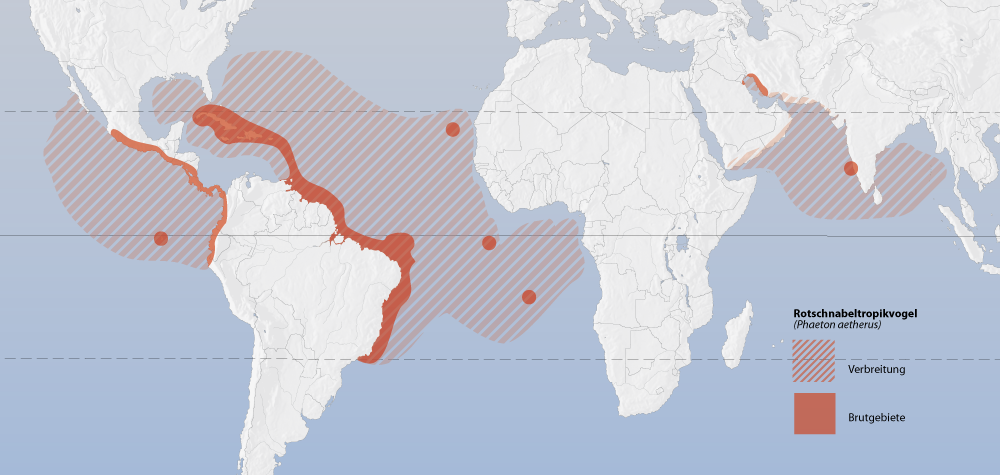 Verbreitung und Brutgebiete des Rotschnabel-Tropikvogels (Phaeton aethereus)